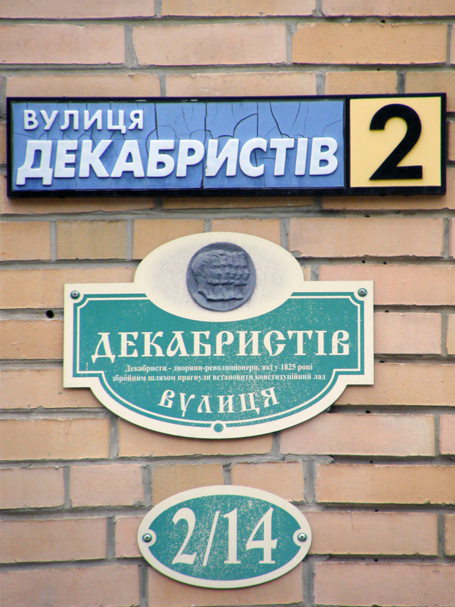 улица Декабристов